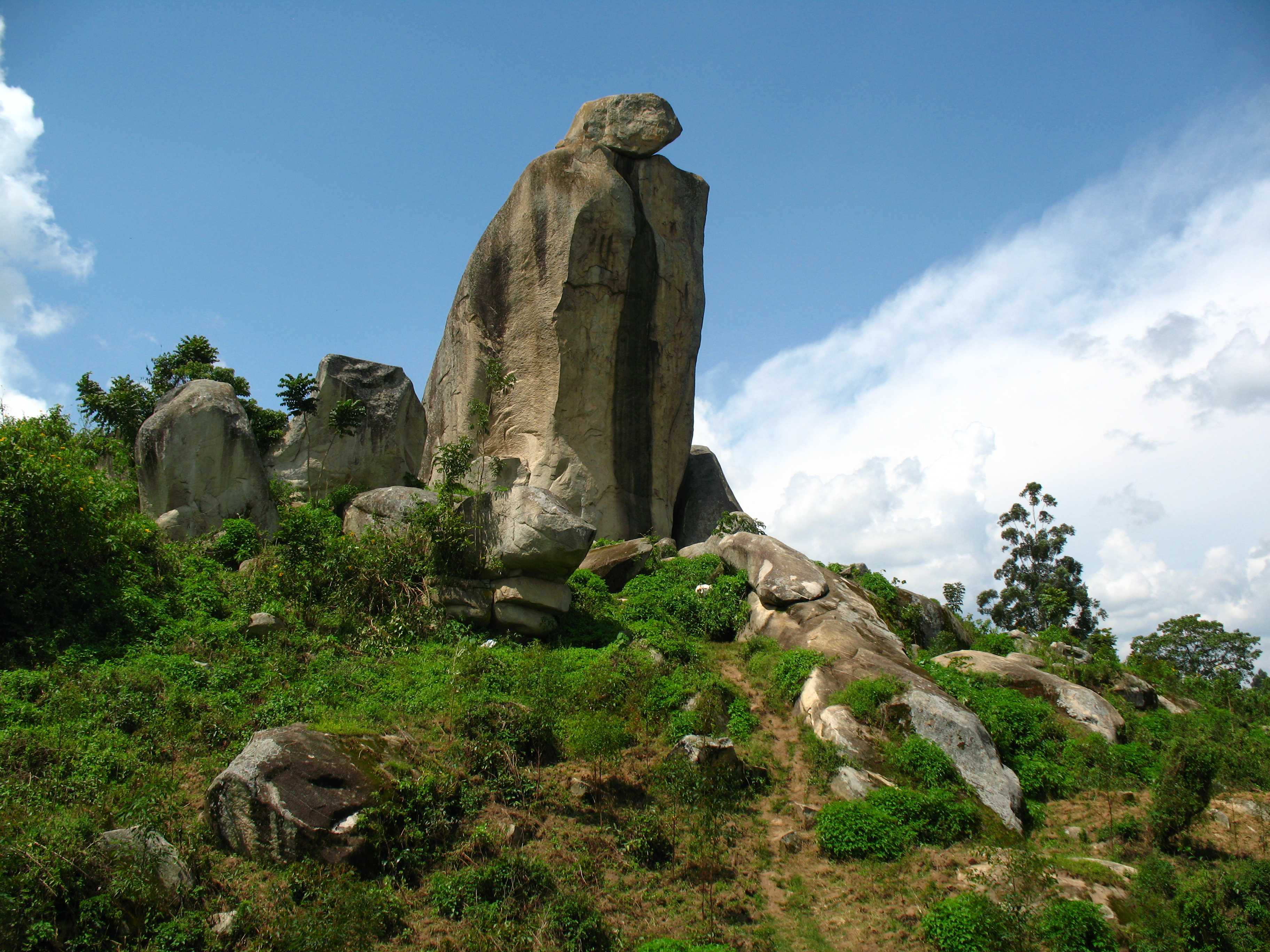 Kiswahili: Jiwe la kulia